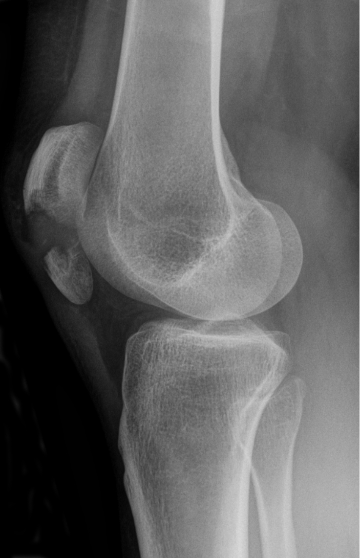 Querfraktur der Patella im seitlichen Röntgenbild.